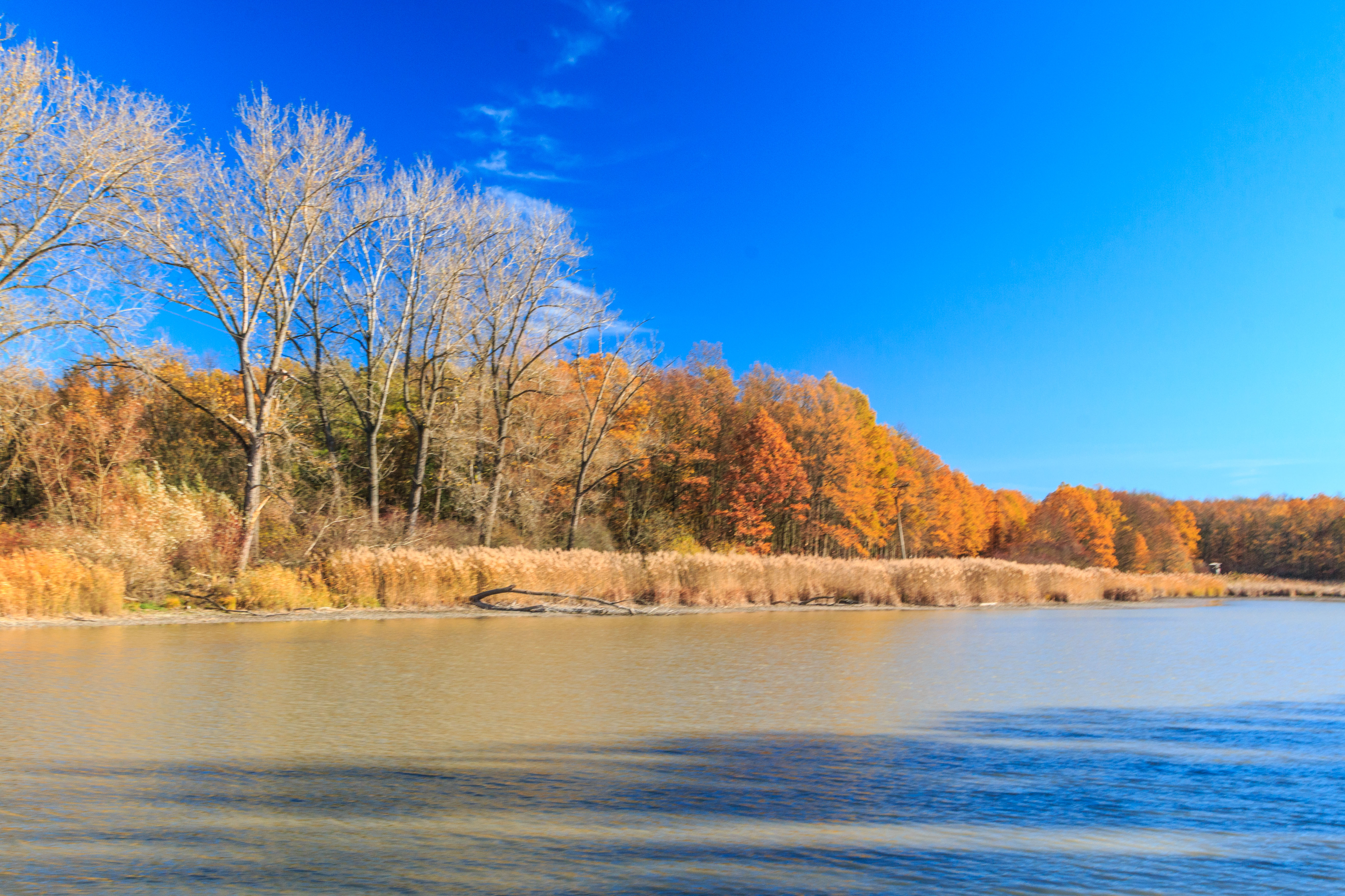 Horní rybník u Rožďalovic Project: Vodstvo.